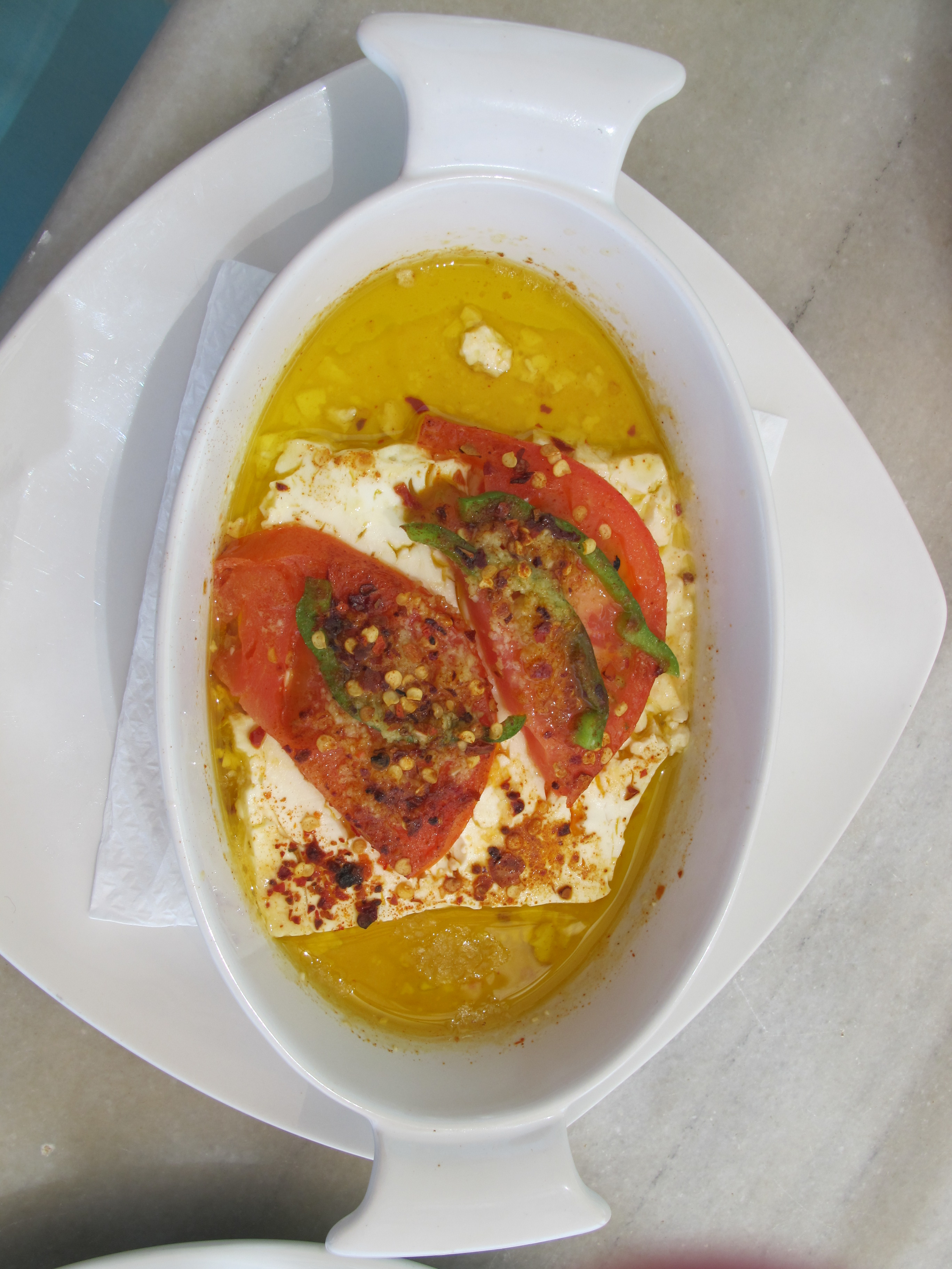 Feta Saganaki